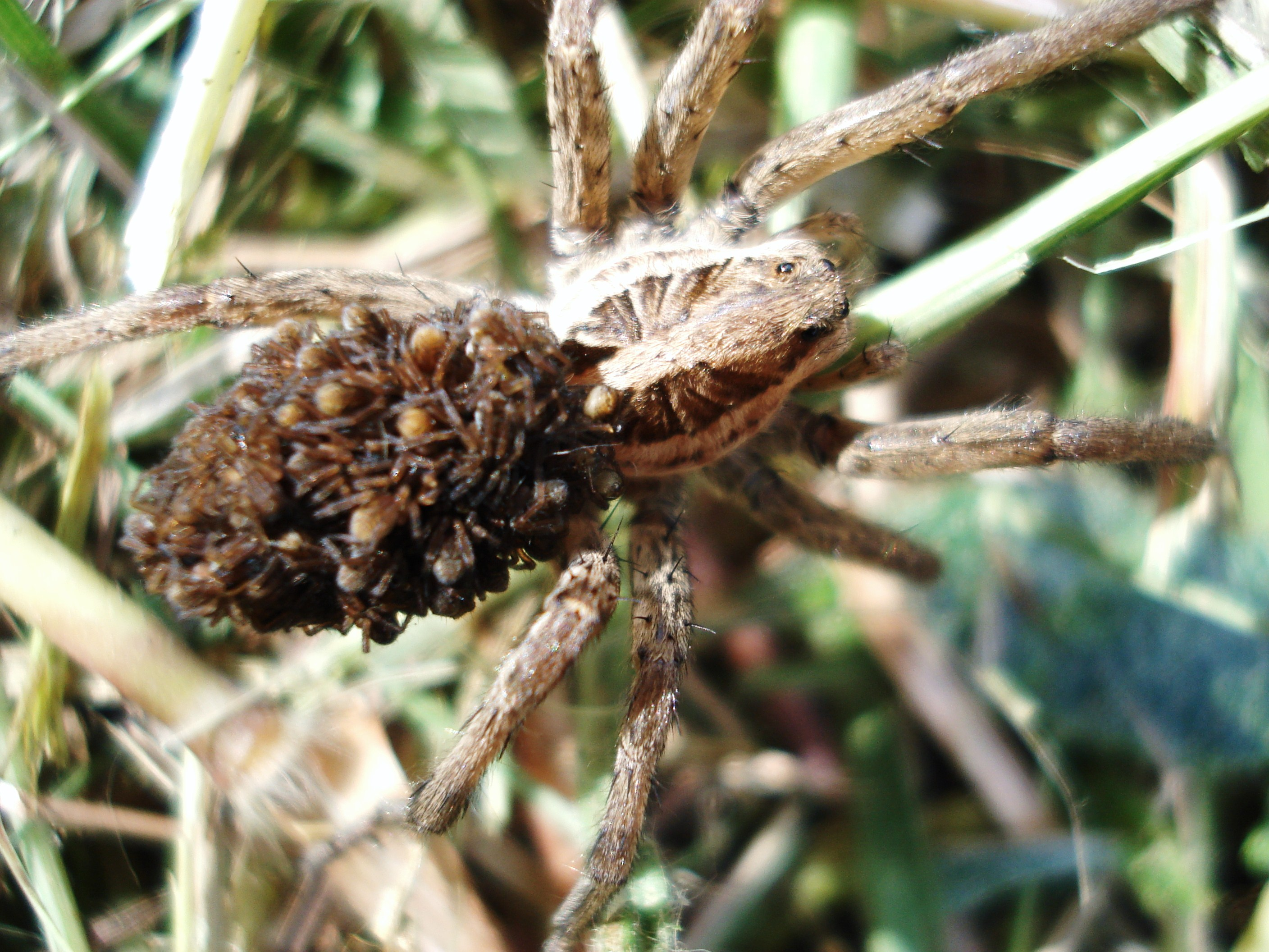 Tarentule (Lycosa tarentula)